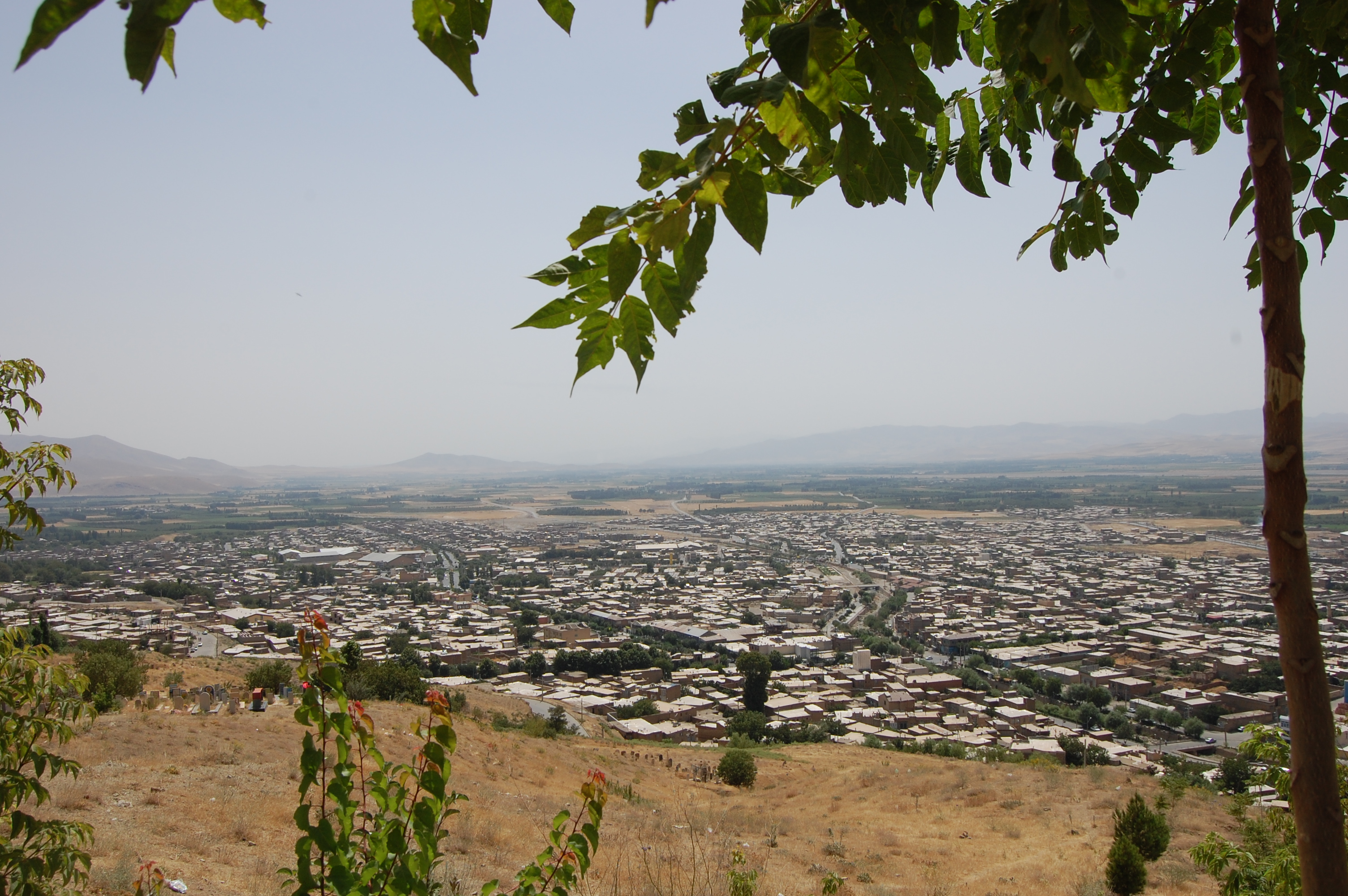 iran, nalivan